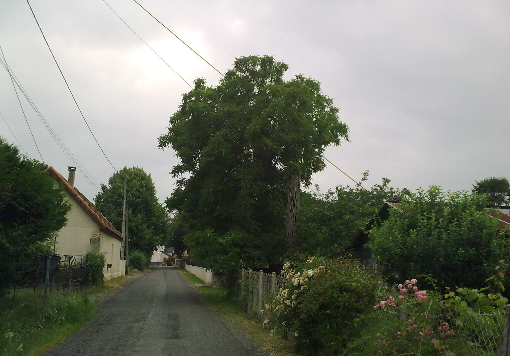 Momy 1